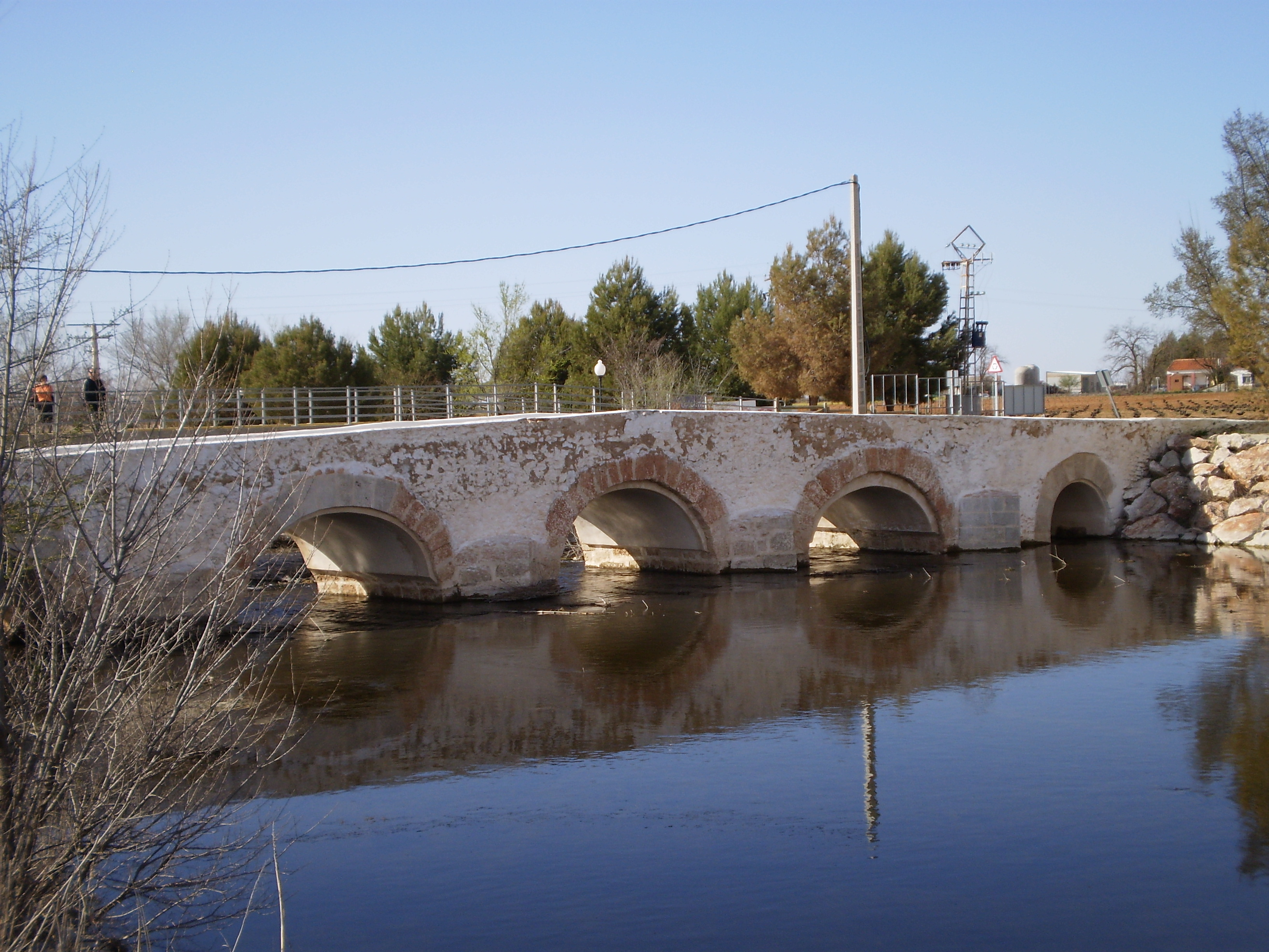 El puente de San Miguel sobre el río Záncara en Pedro Muñoz.